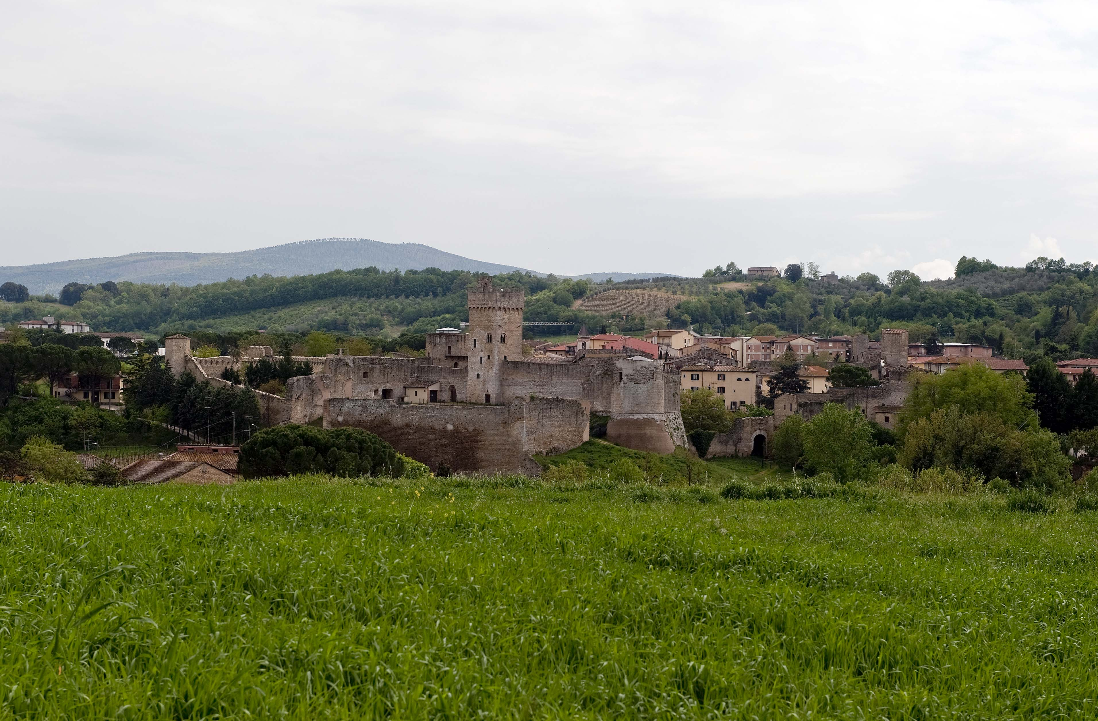 Panorama di Staggia Senese - Poggibonsi - Siena